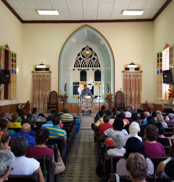 Congregación en el culto ( I Iglesia Bautista Eben-Ezer ) Manzanillo - Cuba